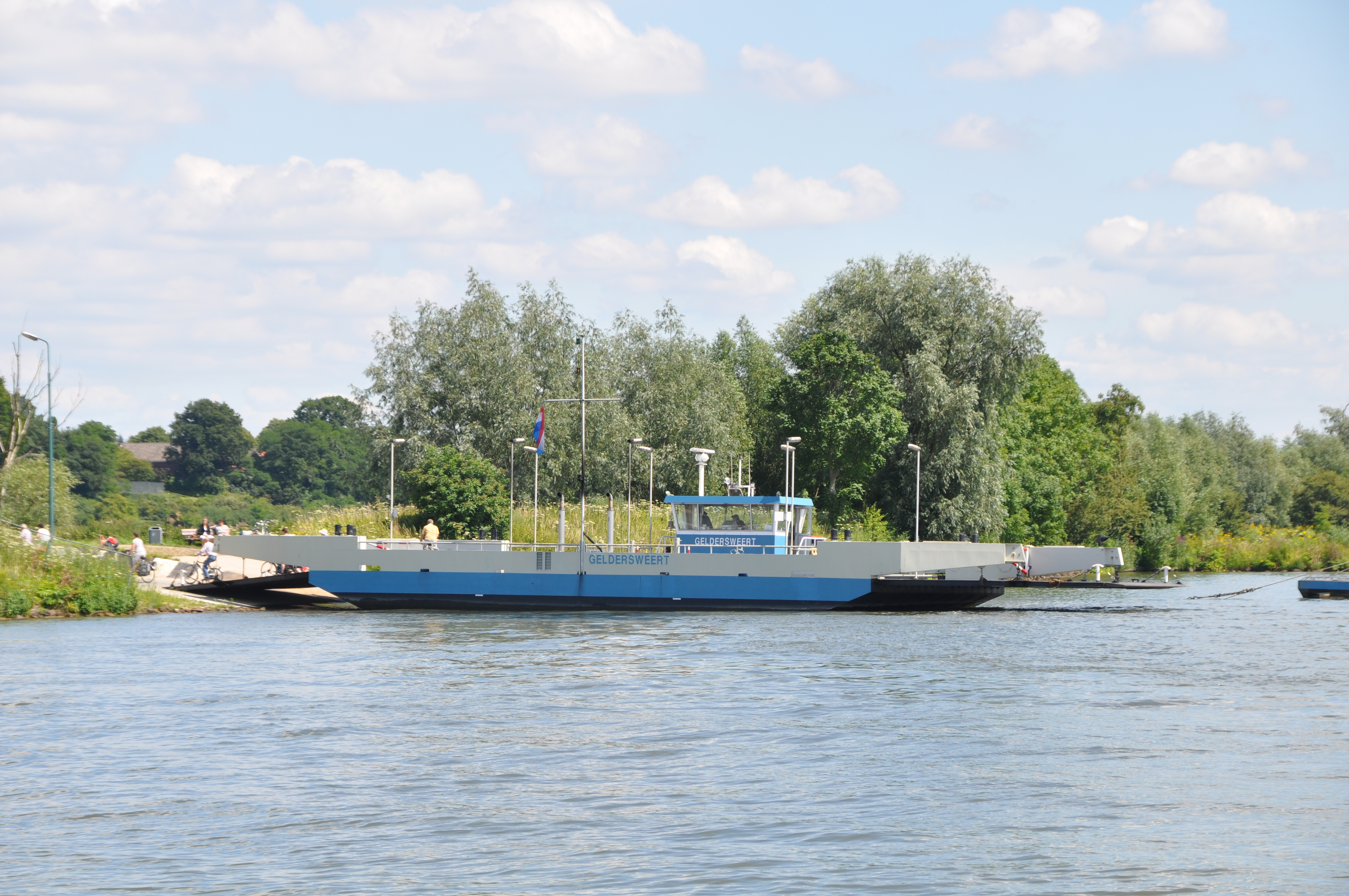 Het Ingensche Veer GELDERSWEERT, een gierpont over de Nederrijn